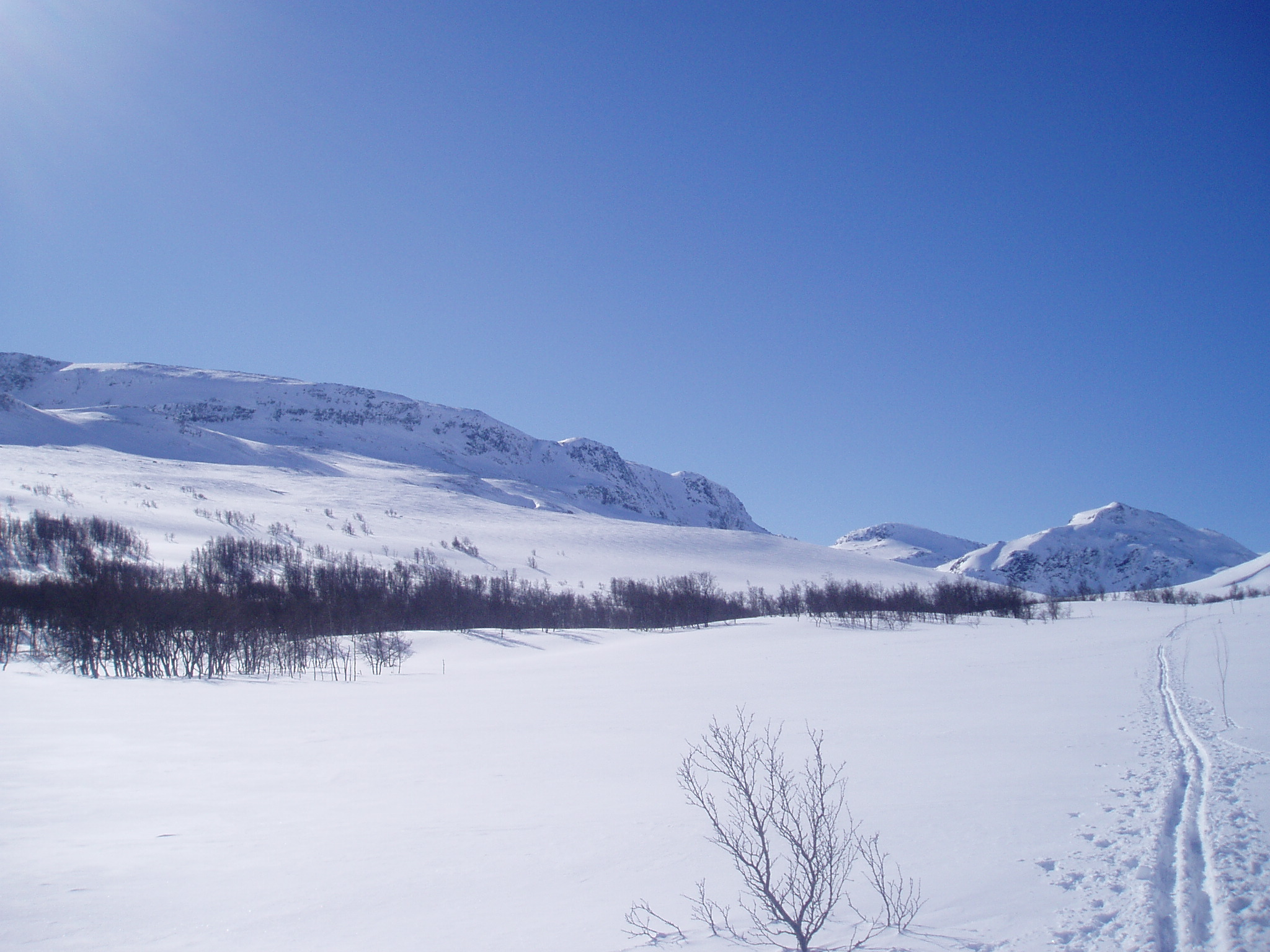 Lensmannsnuten, Raggsteindalen fra Strandevann